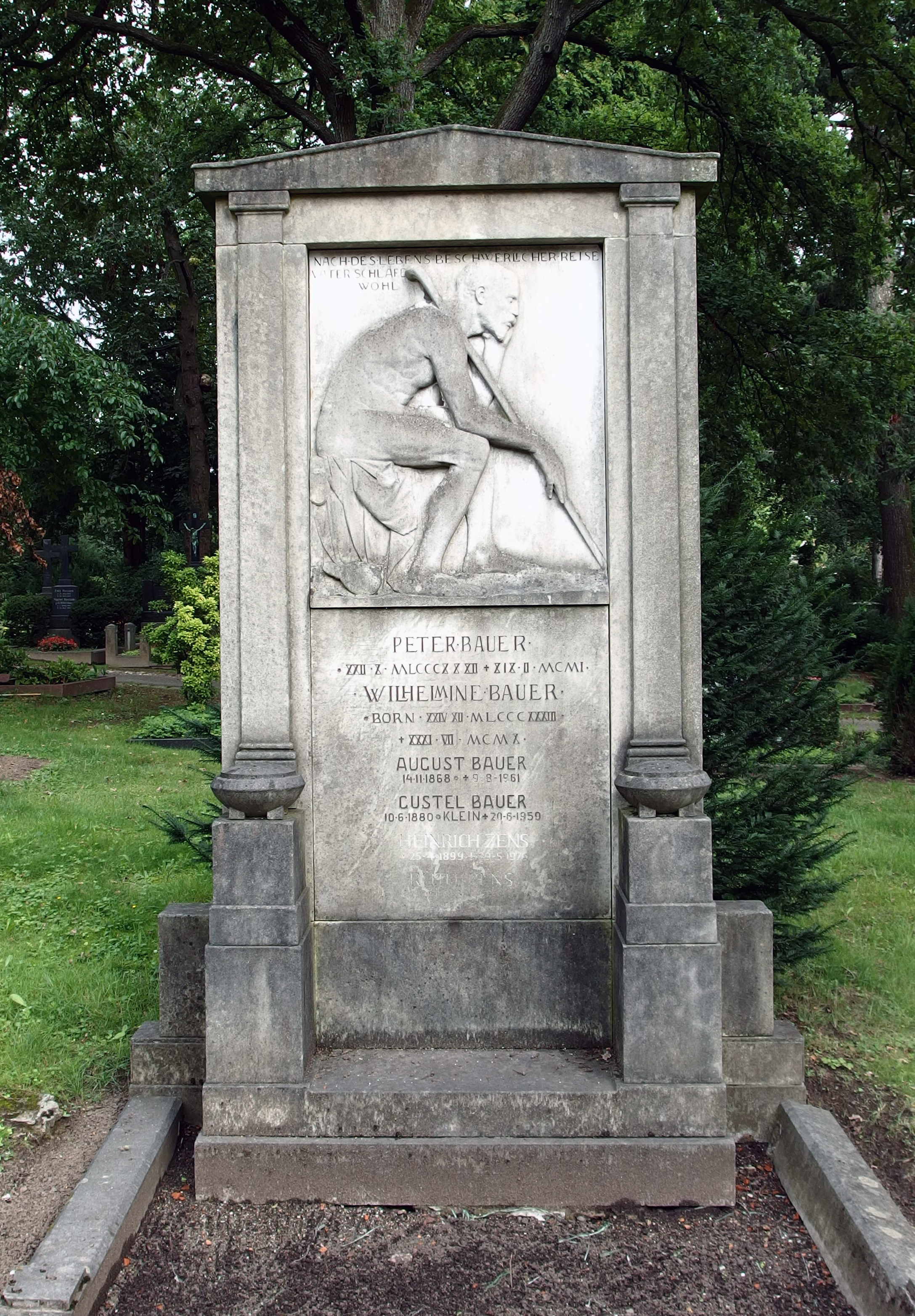 Grabstätte des Bildhauers August Bauer (* 14.11.1868; † 9.08.1961) ⚭ Gustel Bauer, geb. Klein (* 10.06.1880; † 20.06.1959); und der Eltern: Peter Bauer (* 22.10.1832; † 19.02.1901) ⚭ Wilhelmine Bauer (* 24.12.1833; † 31.07.1910); weitere Familienangehörige?: Heinrich Zens (* 25.04.1899; † 29.05.1976); Ruth Zens. Nordfriedhof Düsseldorf